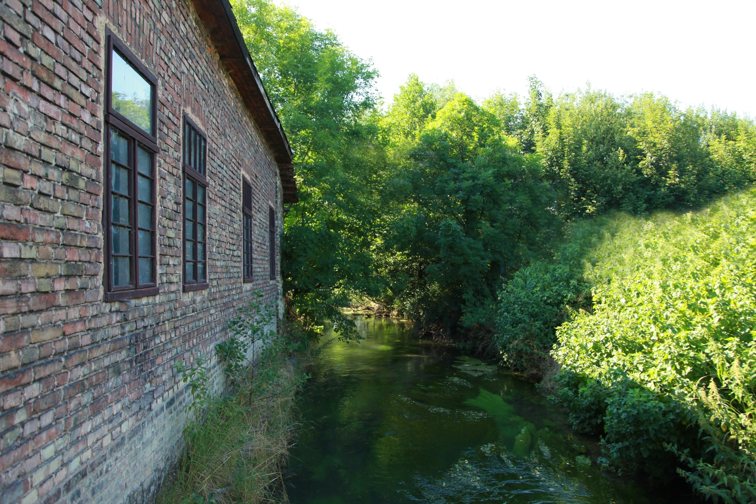 historicky původnější část Josefyho mlýna s náhonem